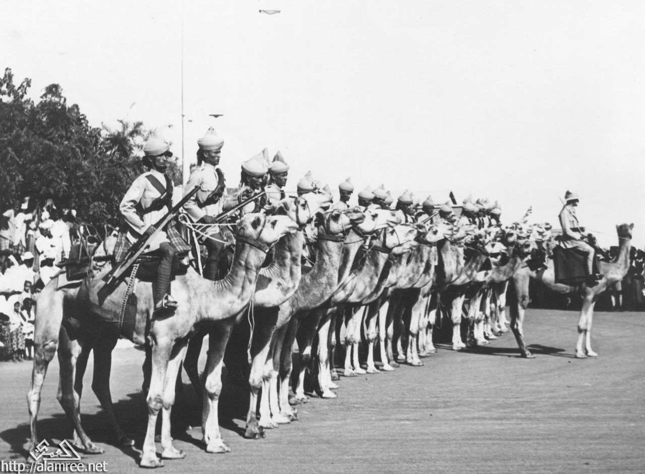 الهجانه في عرض عسكري في التواهي 1930م